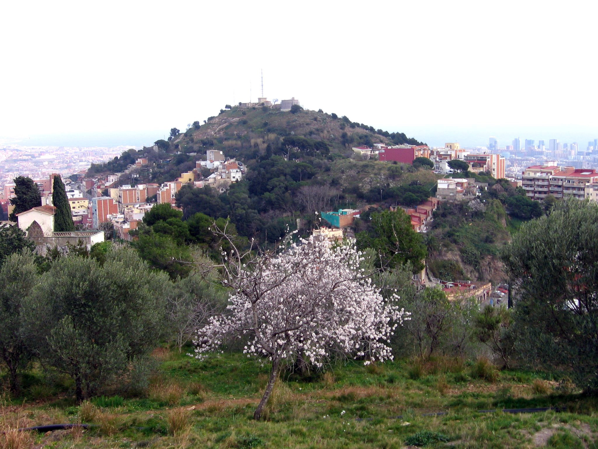 Turó de la Rovira.